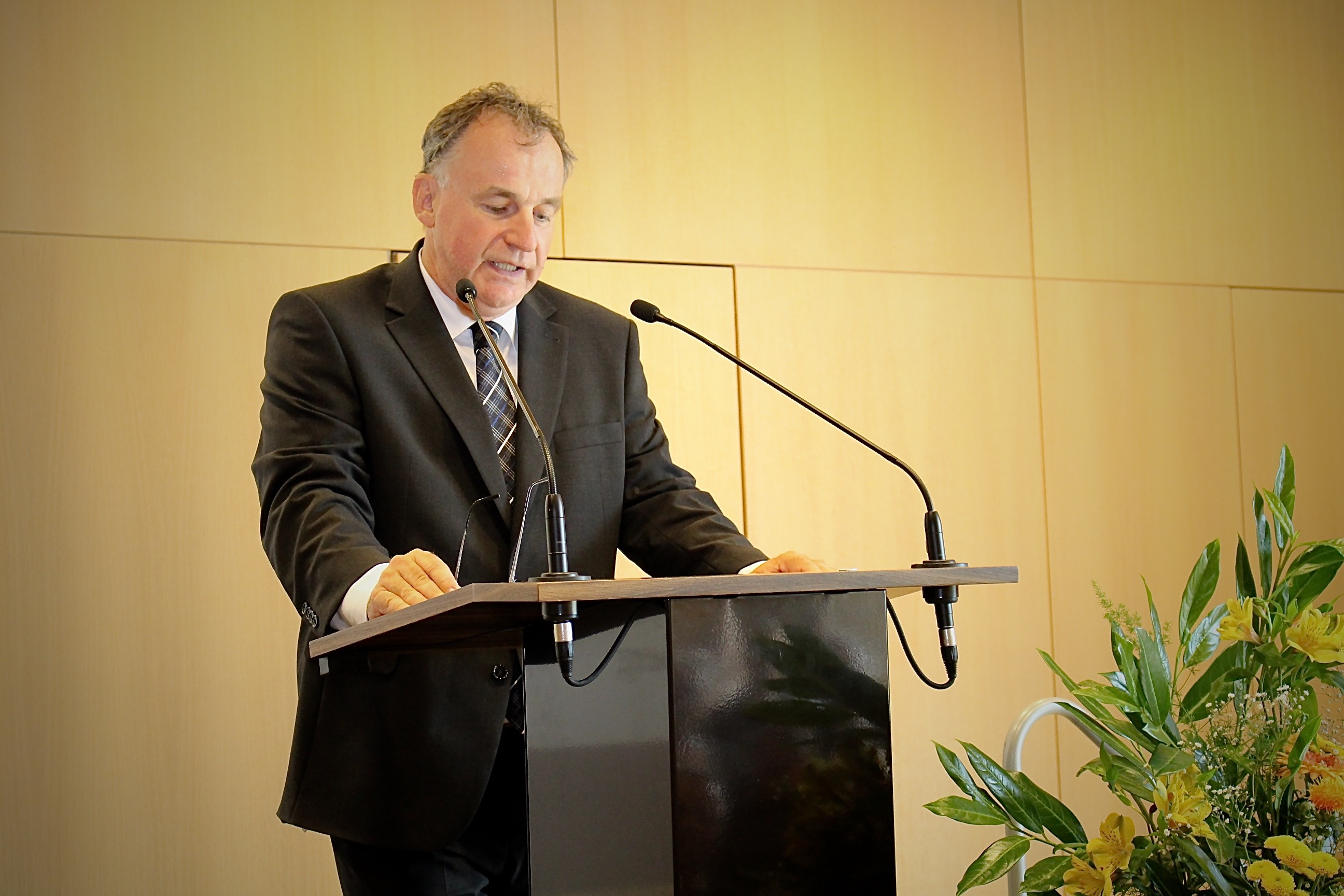 Amtseinführung von Ministerialdirektor Stefan Krebs (Beauftragter der Landesregierung für Informationstechnologie, Baden-Württemberg)